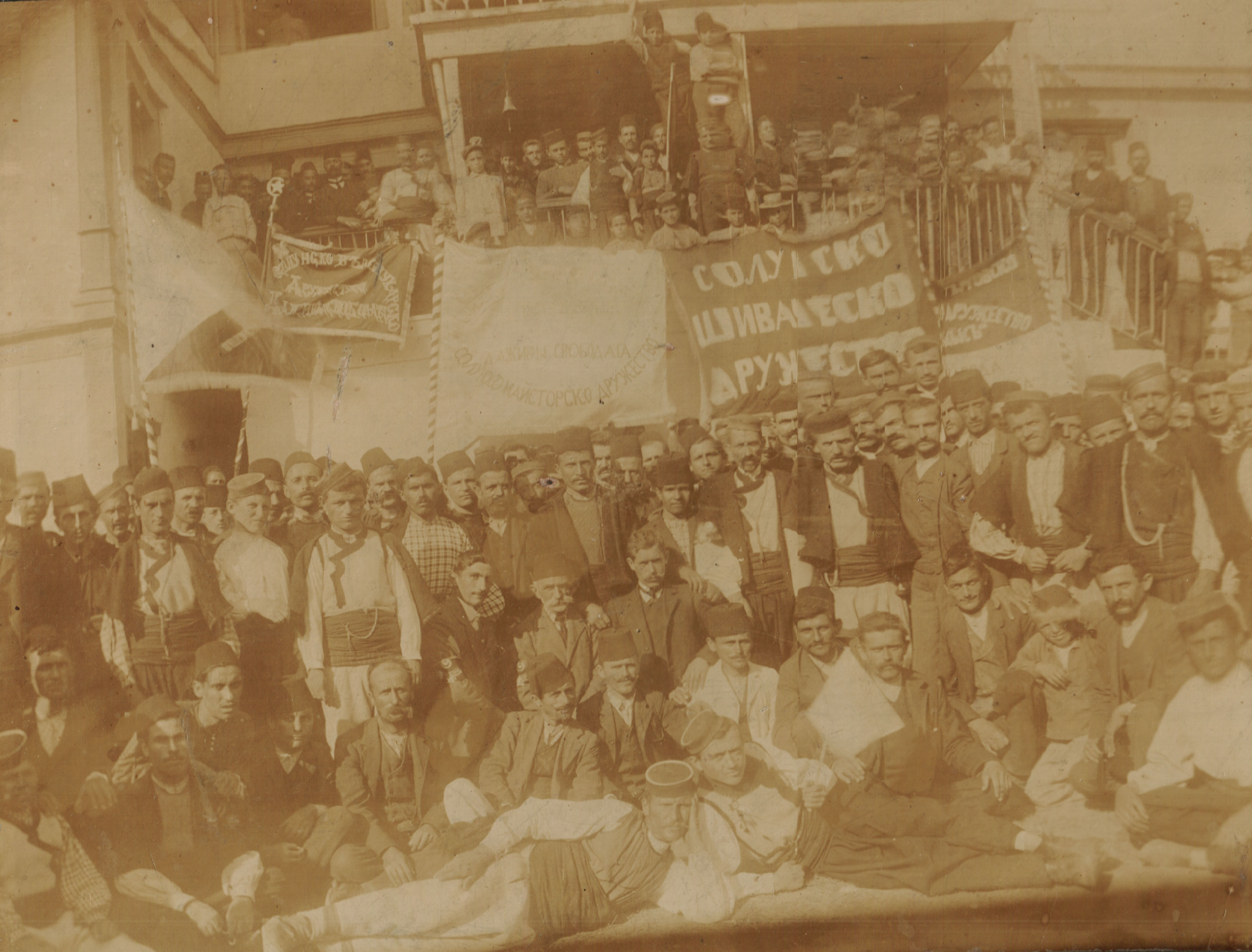 Празненство на солунските дружества по случай Кирил и Методий, 1906 г., Мъжката гимназия в Солун.